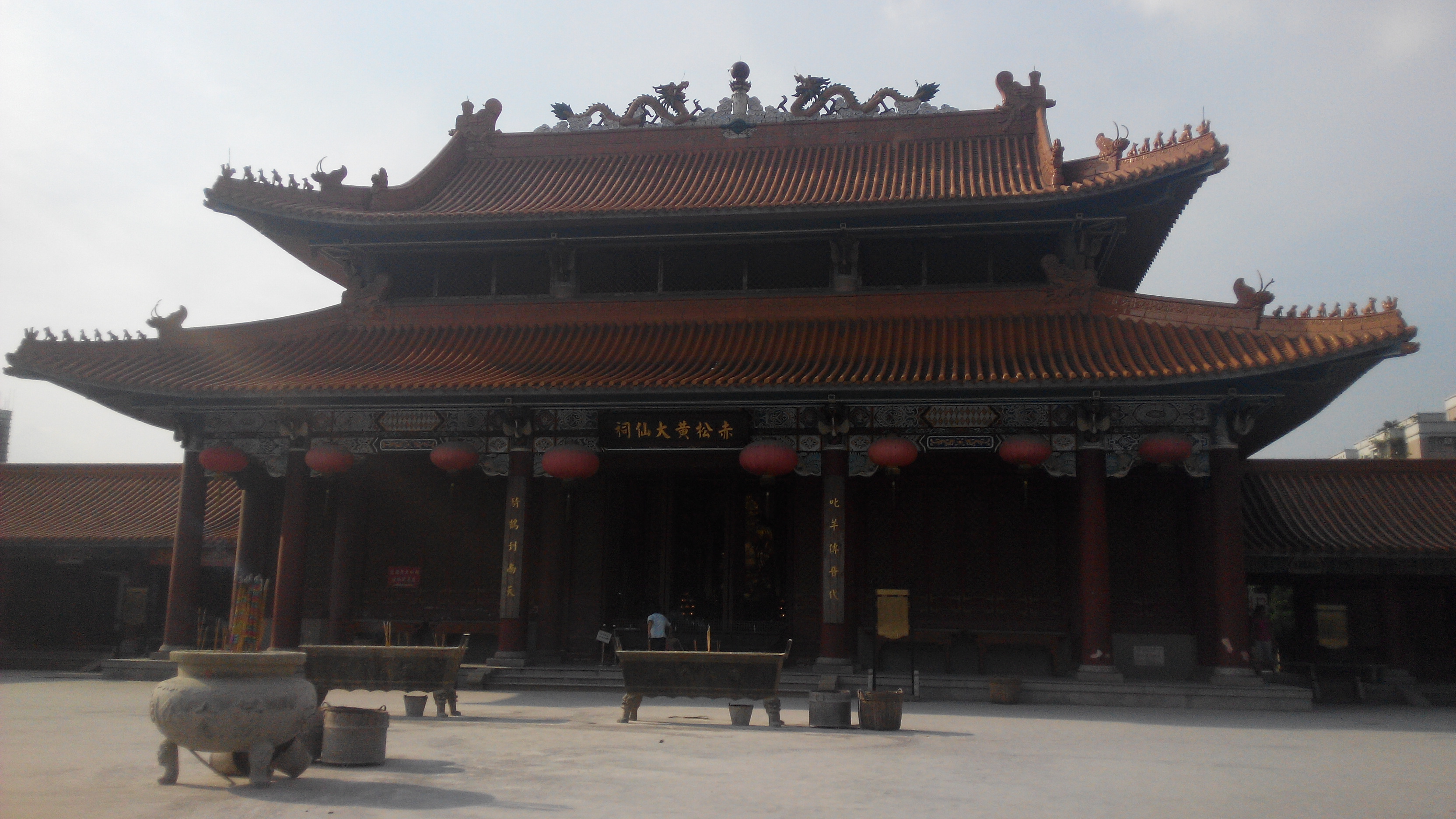 廣州市芳村黃大仙祠。版權說明：使用本相片必須署名，否則CC協議將失效，並追究相應的法律責任。